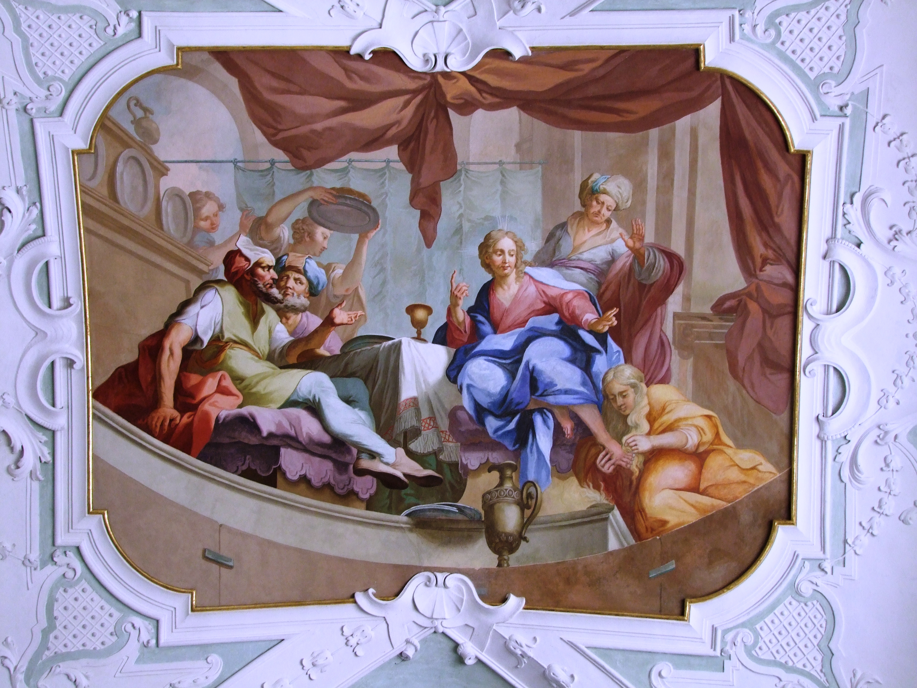 St. Georg, ehemalige Klosterkirche des oberschwäbischen Klosters Ochsenhausen